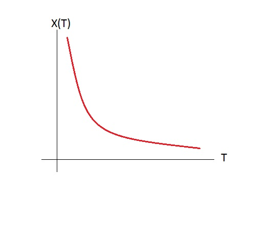 Evolution de la susceptibilité en fonction de la température